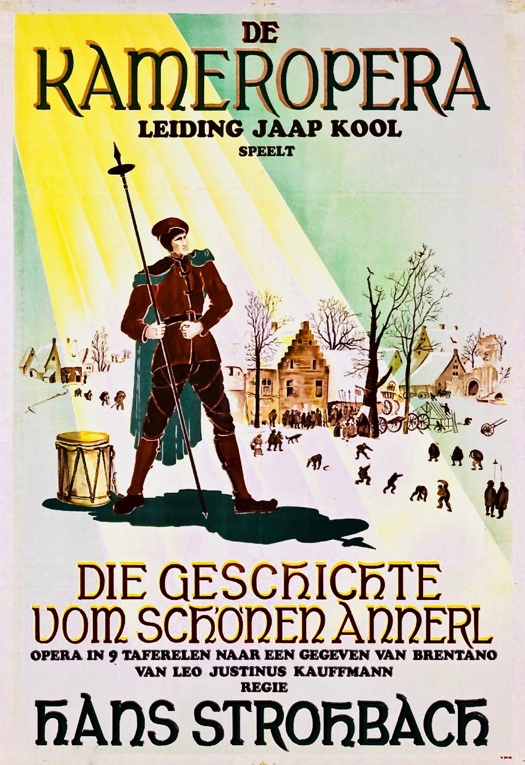 De Kameropera unter Leitung von Jaap Kool (1891–1959): Die Geschichte vom schönen Annerl, Oper in neun Tafeln nach Clemens von Brentano, Regie: Hans Strohbach (1891–1949)